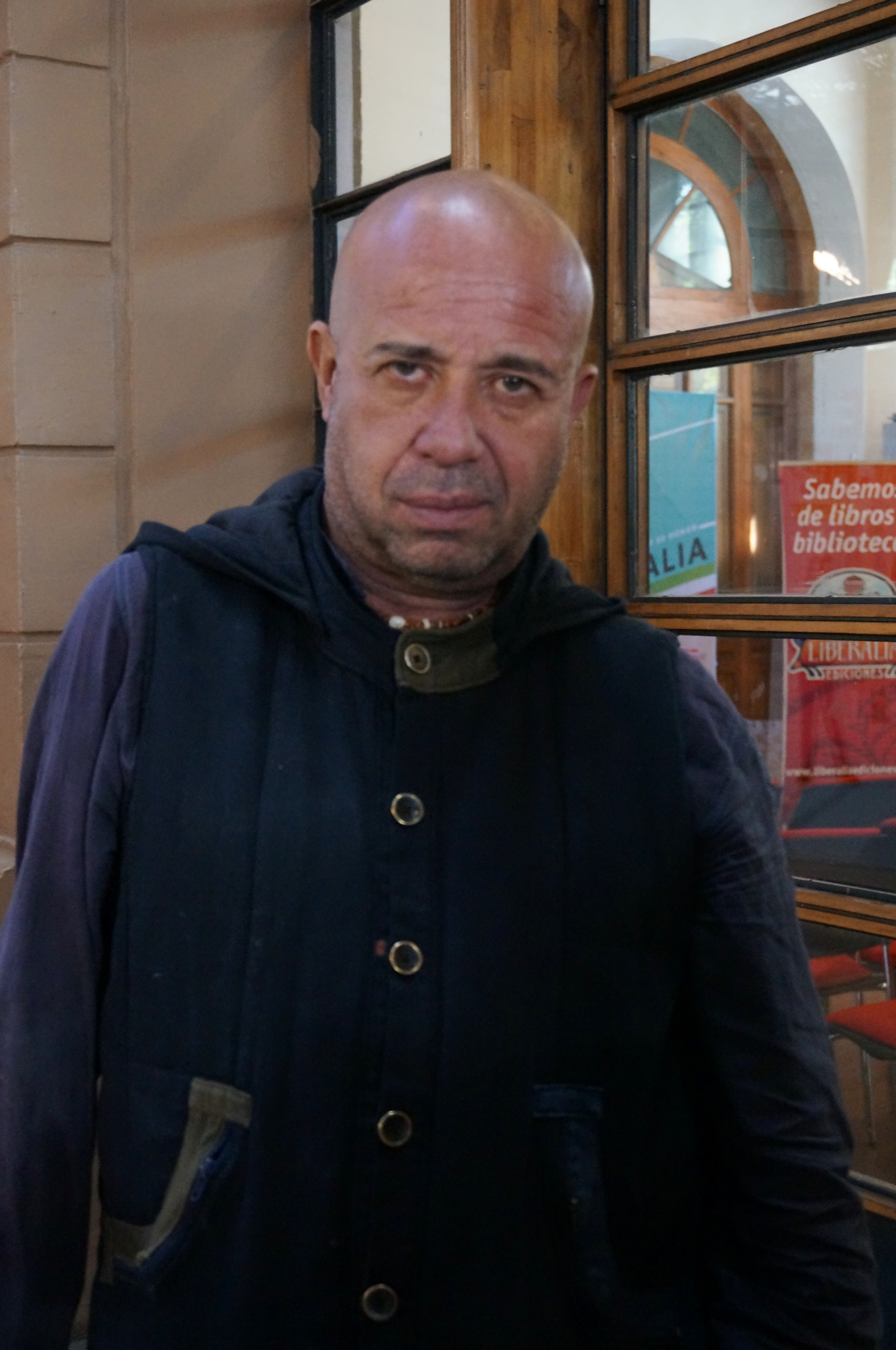 El escritor peruano-mexicano Mario Bellatin en la Feria Internacional del Libro de Santiago 2017.